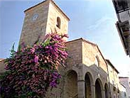 Vista de la iglesia de Torremenga, en Cáceres (España)